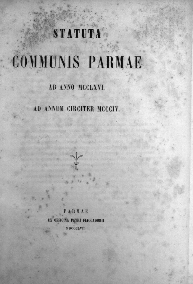 Frontespizio